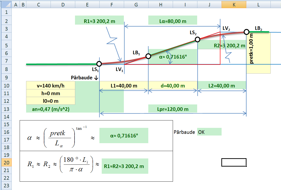 Viens S - veida līknes iespējamais variants, kā starpceļu attālumu palielināt par 1 m